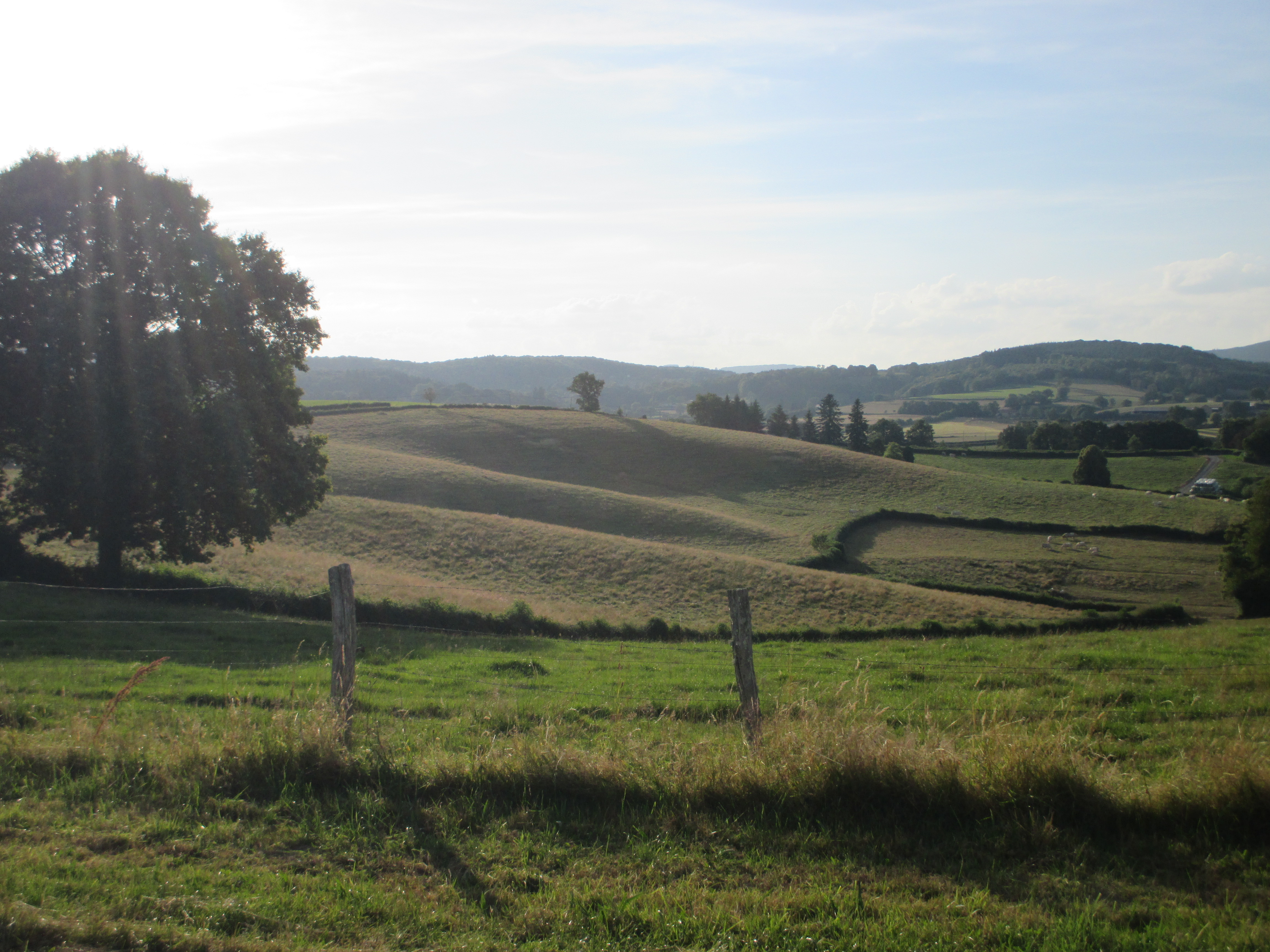 Vue sur les alentours de Poil (Nièvre, France).